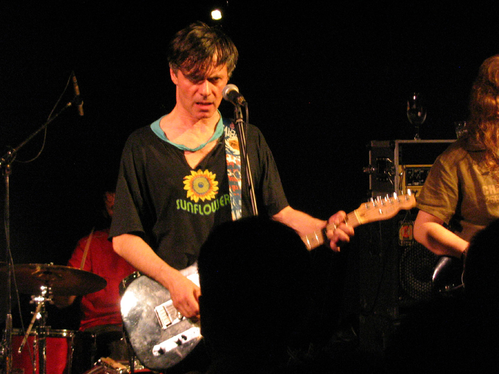 17/11/2006 - Diaframma al Vertigine (Area Sismica)